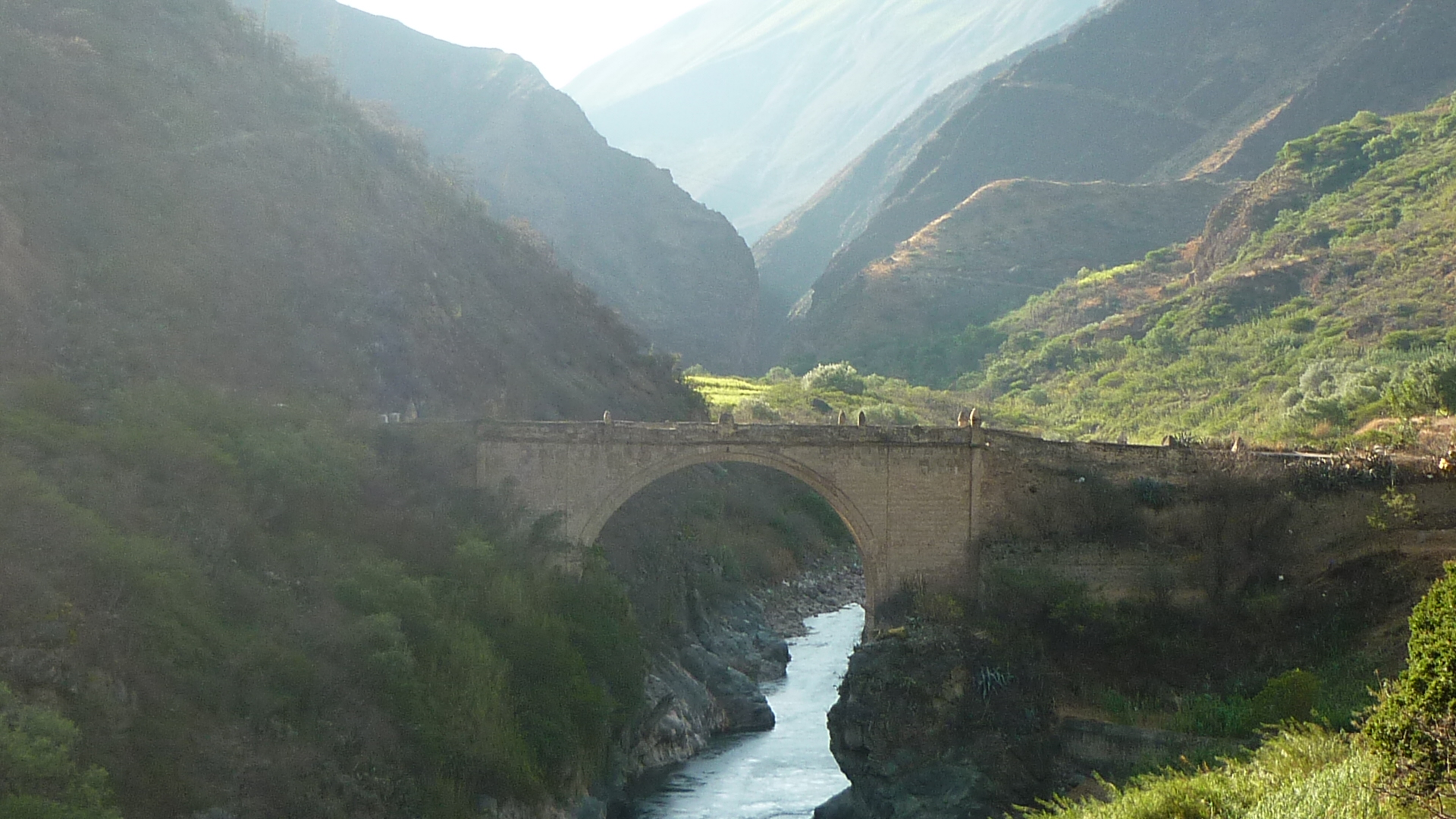 Puente colonial de Pachachaca